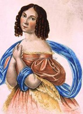 Déryné Széppataki Róza, az első Melinda. Kohlmann Károly színezett acélmetszete.